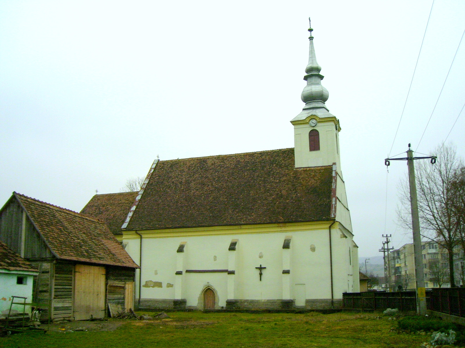 Die katholische Kirche im Stadtzentrum von Cristuru Secuiesc (Székelykeresztúr, Siebenbürgen).